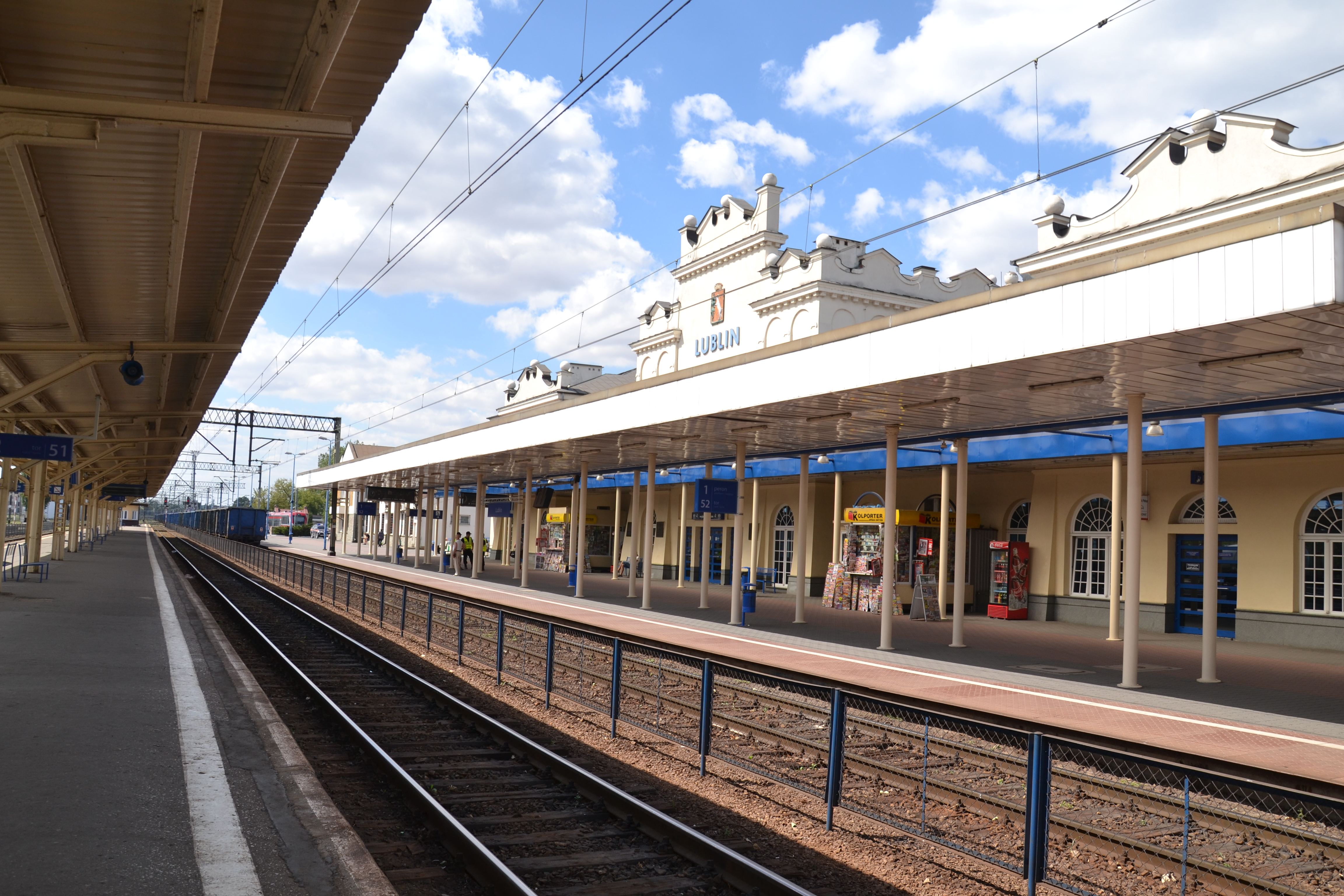 Widok dworca kolejowego w Lublinie od strony peronów This photo was taken during Railway Wikiexpedition 2015 set up by Wikimedia Polska Association in cooperation with Fundacja Grupy PKP. You can see all photographs in category Wikiekspedycja kolejowa 2015.